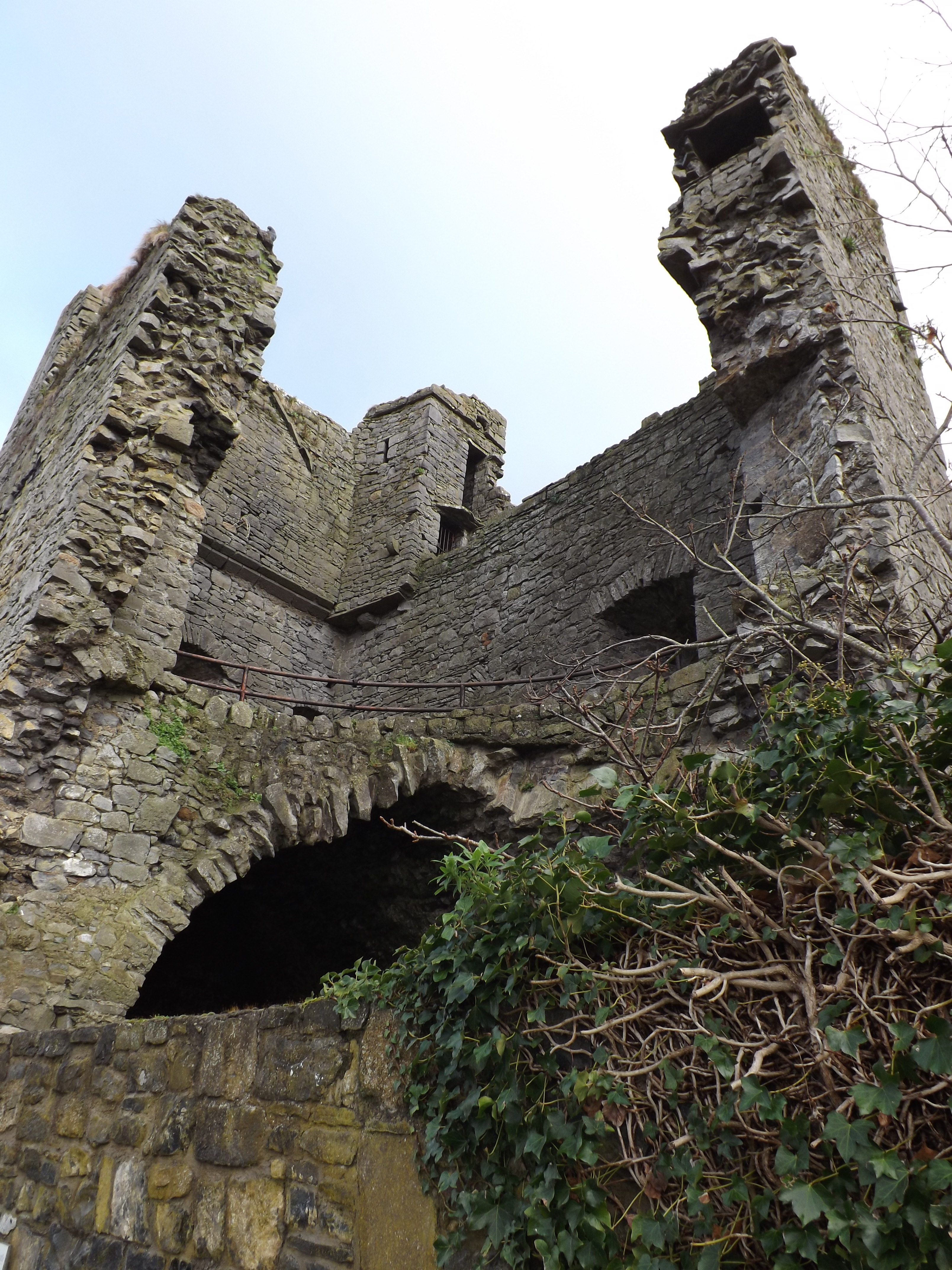 Leighlinbridge Castle